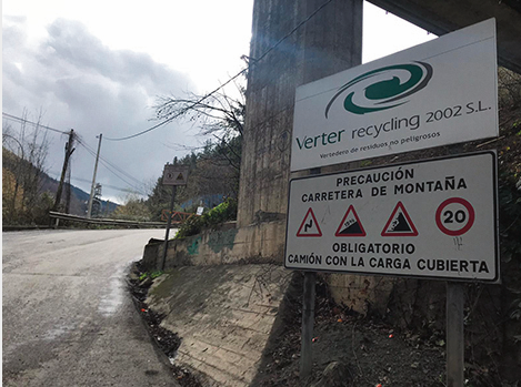 Verter Recycling 2002 enpresaren kartelak, erdara hutsean